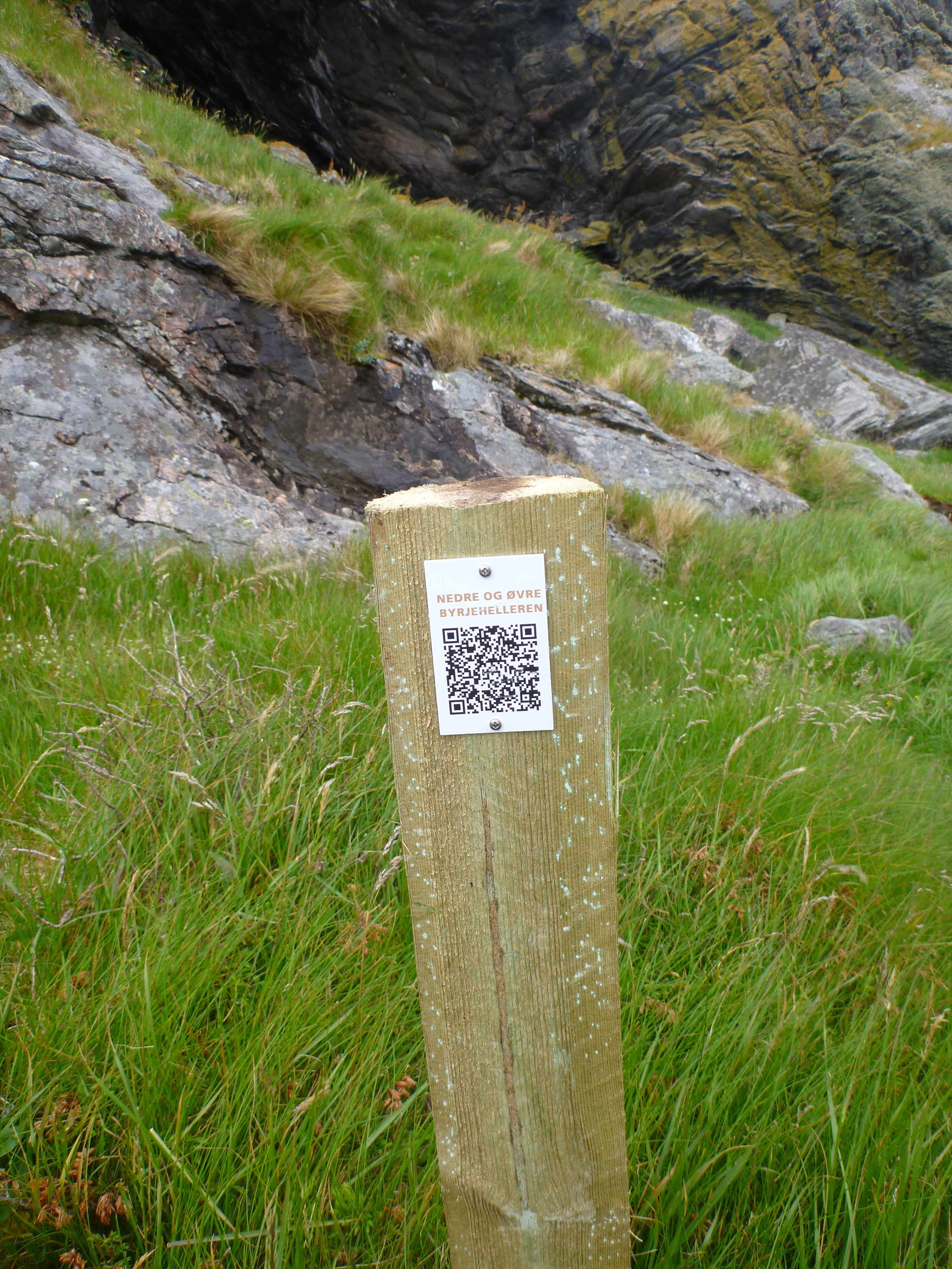 Dette skiltet står ved Nedre og øvre Byrjehelleren på Kinn.